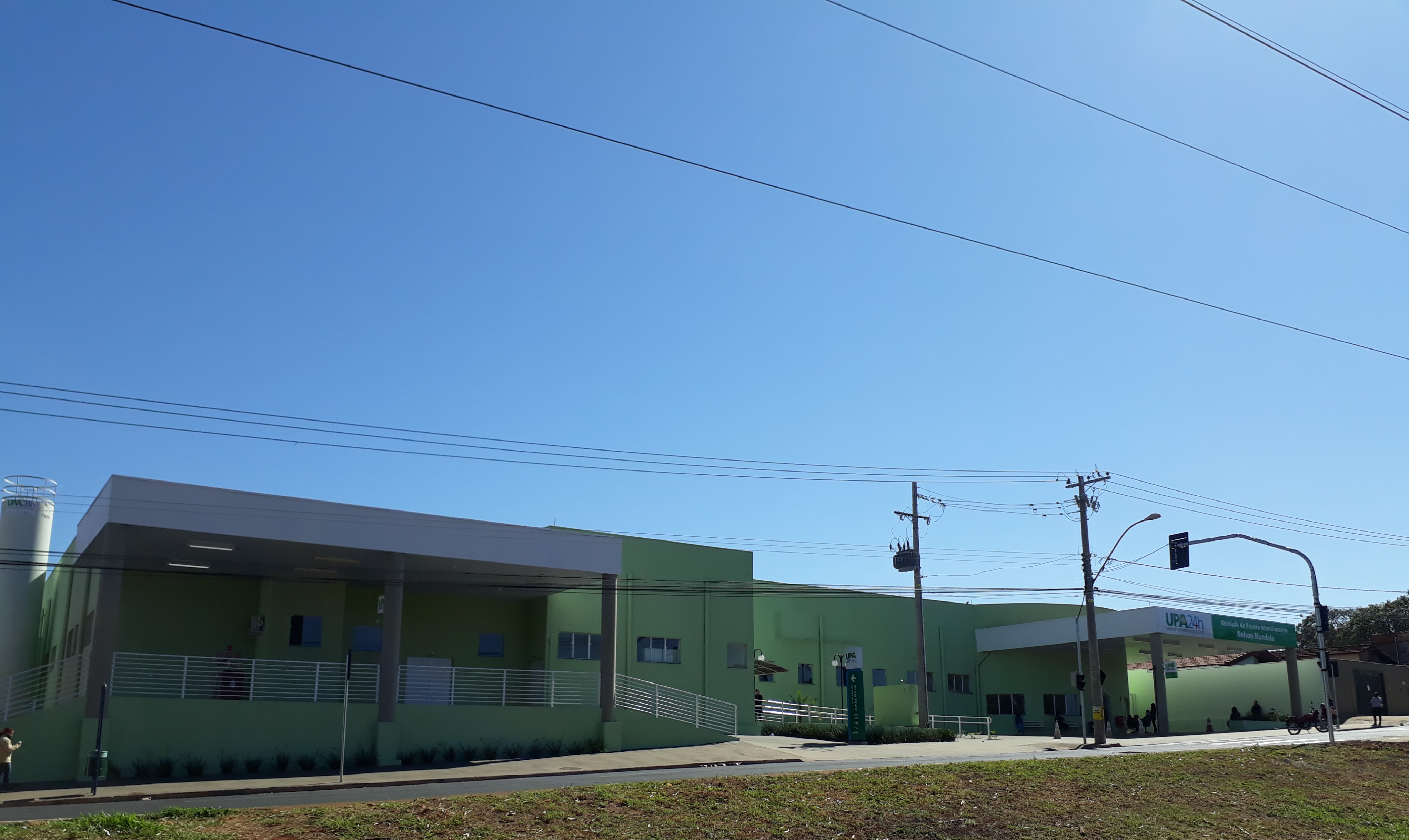 UPA Norte de Ribeirão Preto